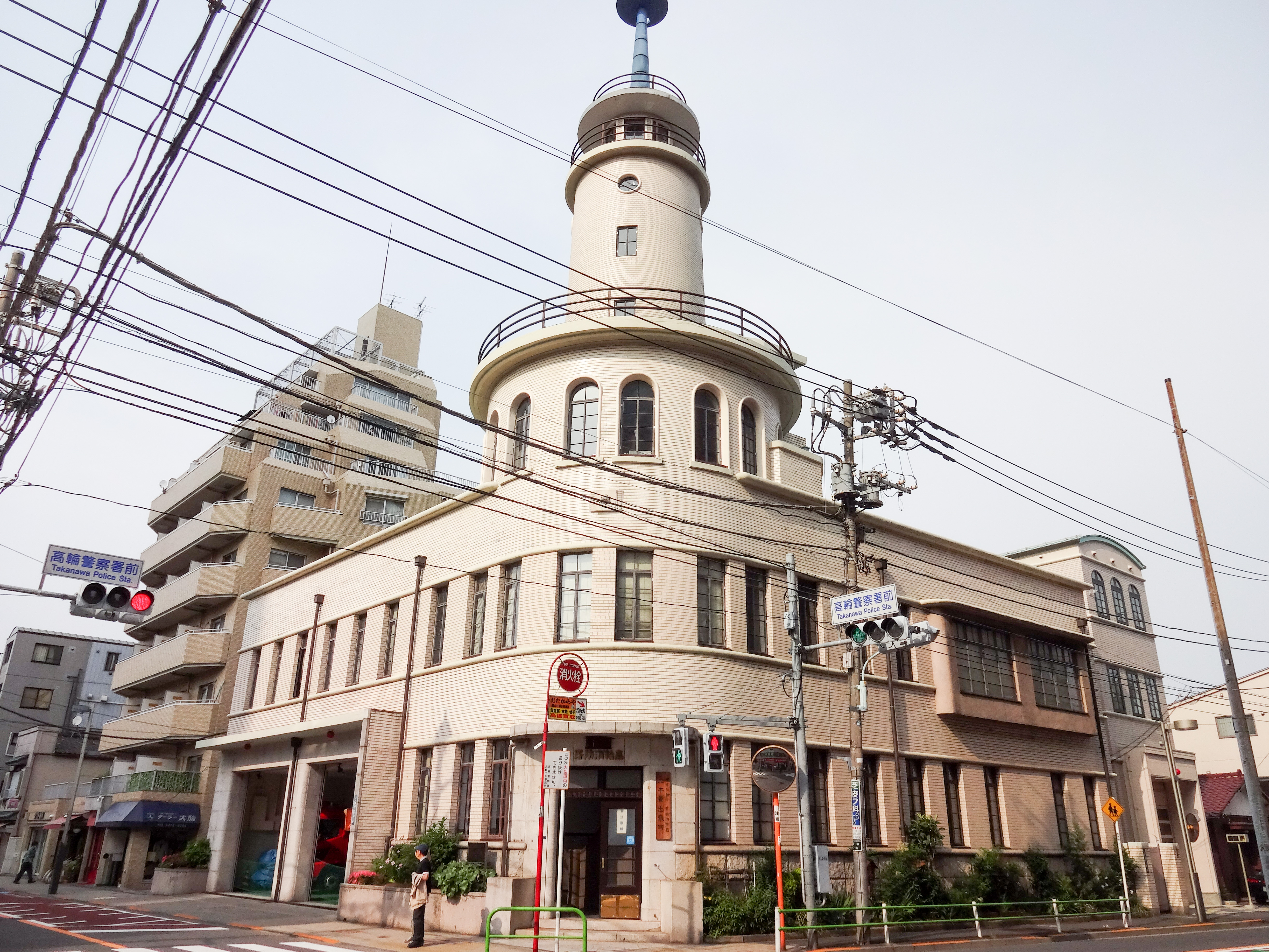 高輪消防署二本榎出張所の外観。